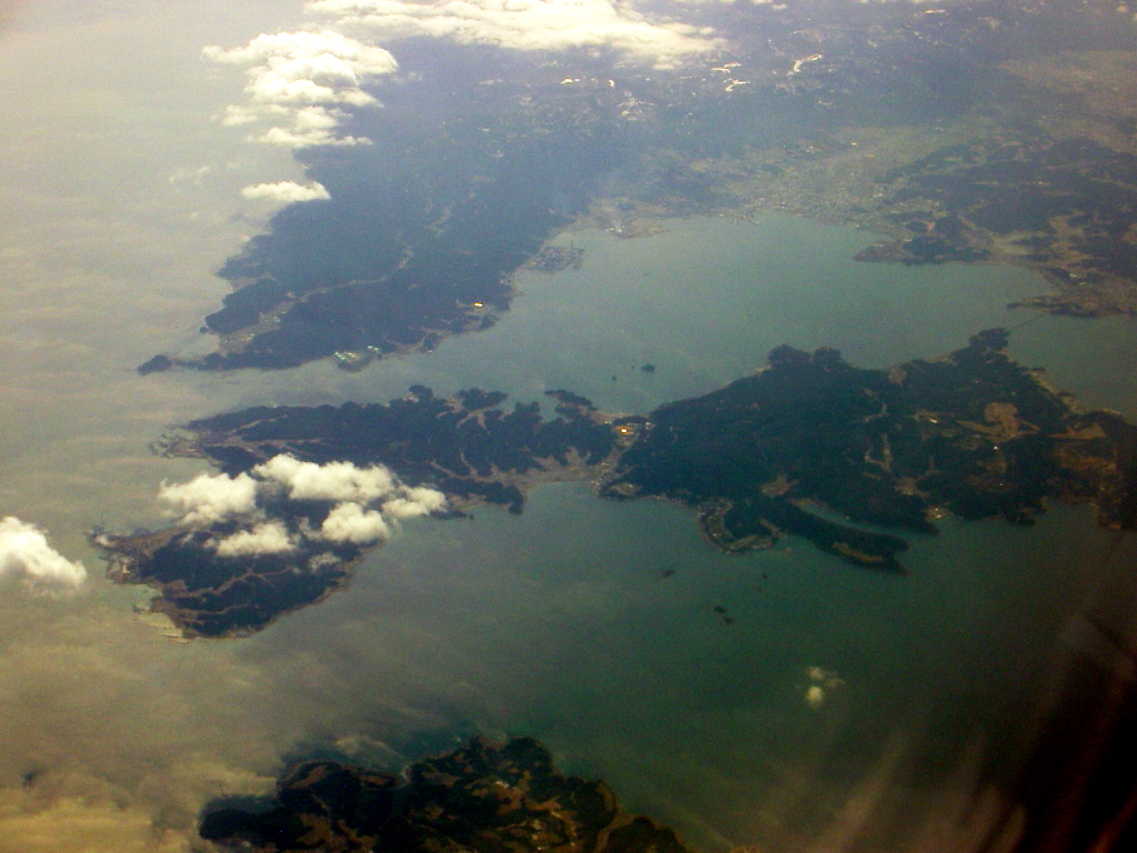 Notojima Island, Japan. 能登島．